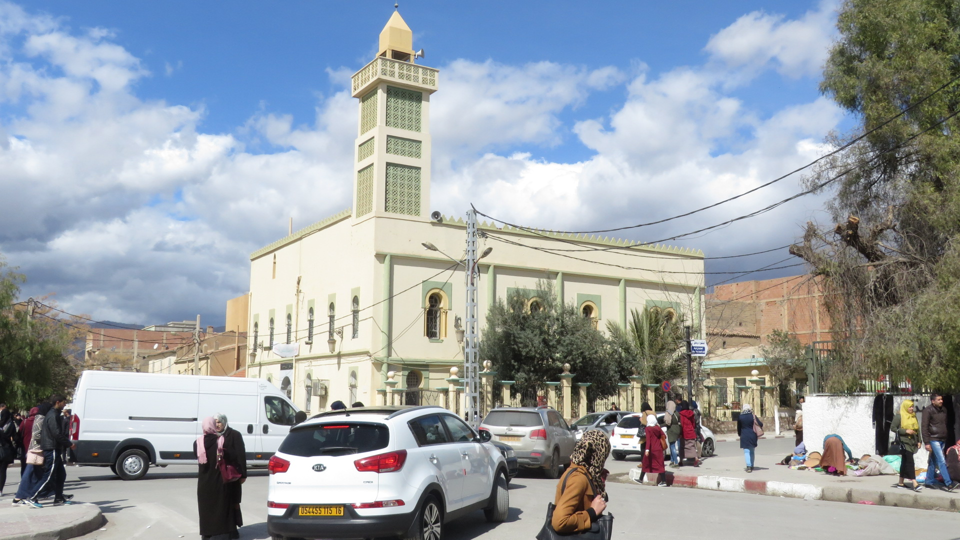 Al Atik mosquée Batna